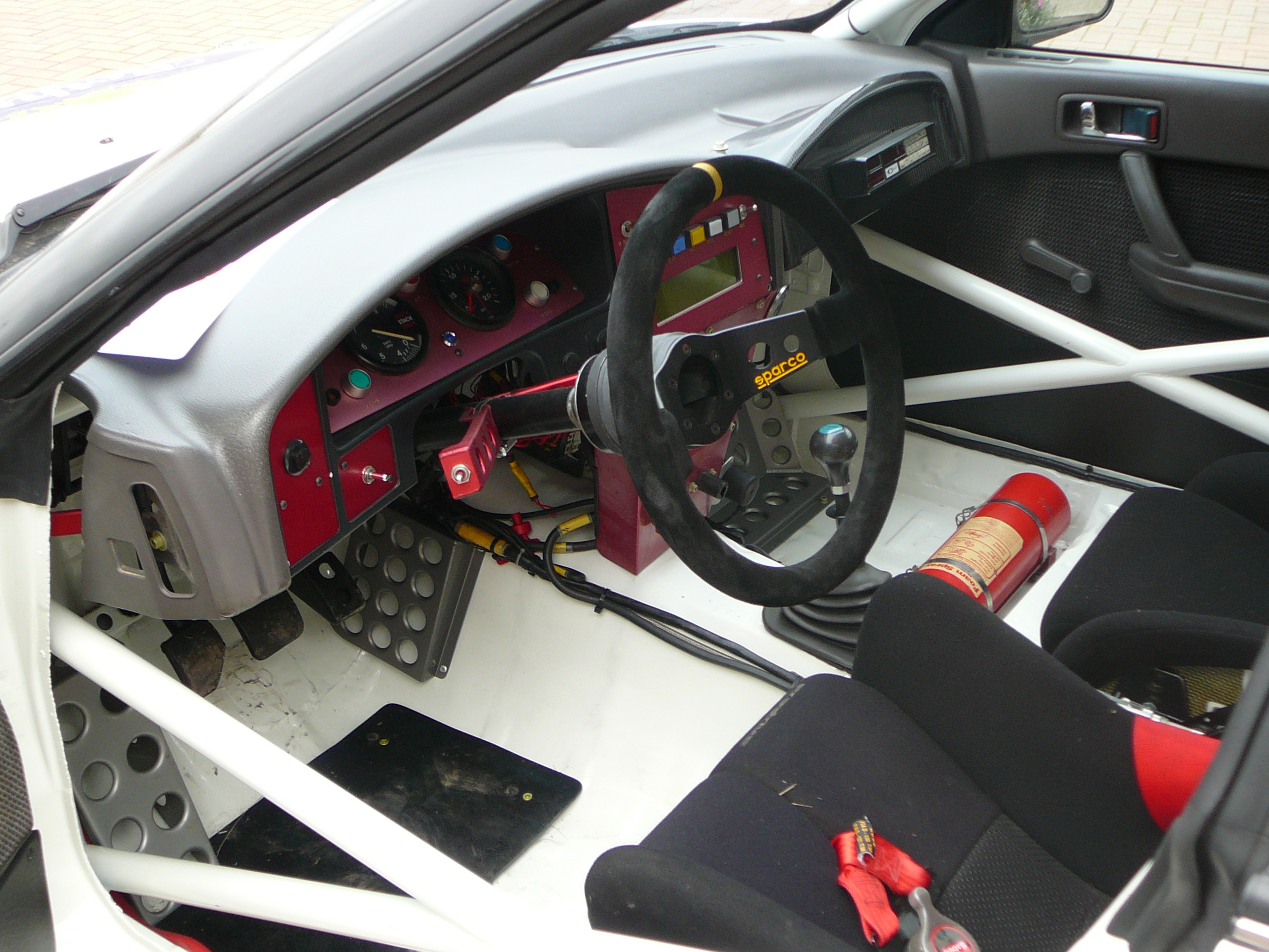 Cockpit details